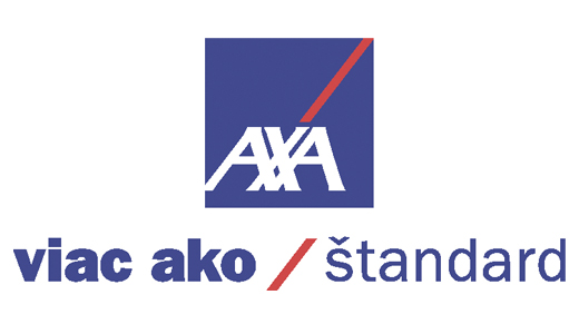 Logo spoločnosti AXA